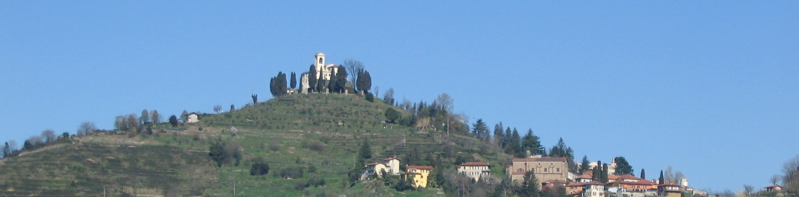 Vista Panoramica di Montevecchia